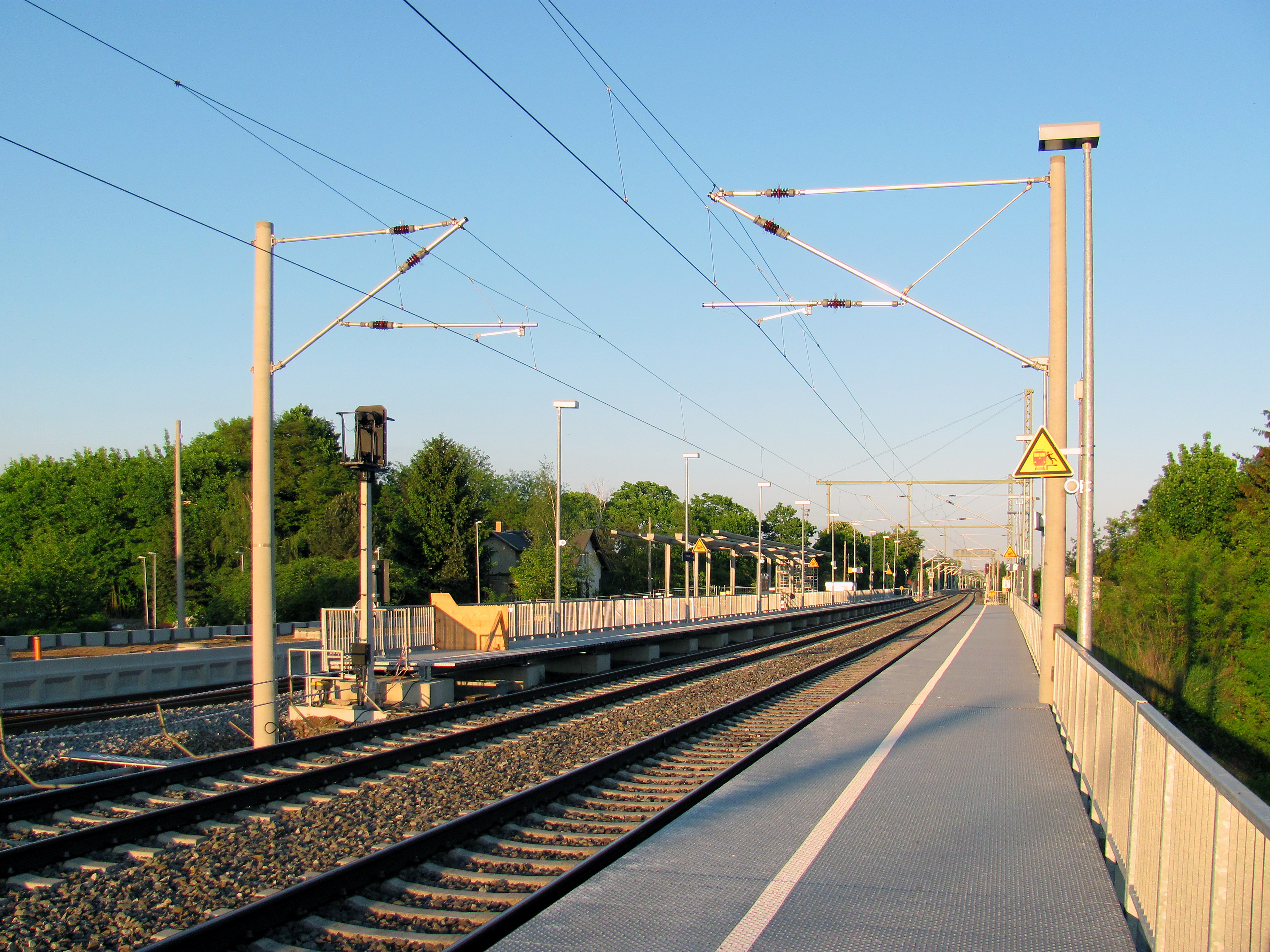 Radebeul, Haltepunkt Radebeul-Weintraube; Behelfsbahnsteige 2012/2013 an den Fernbahngleisen, links im Bild ist der damals im Bau befindliche Bahnsteig an den S-Bahn-Gleisen zu sehen, der Ende 2013 in Betrieb genommen wurde.